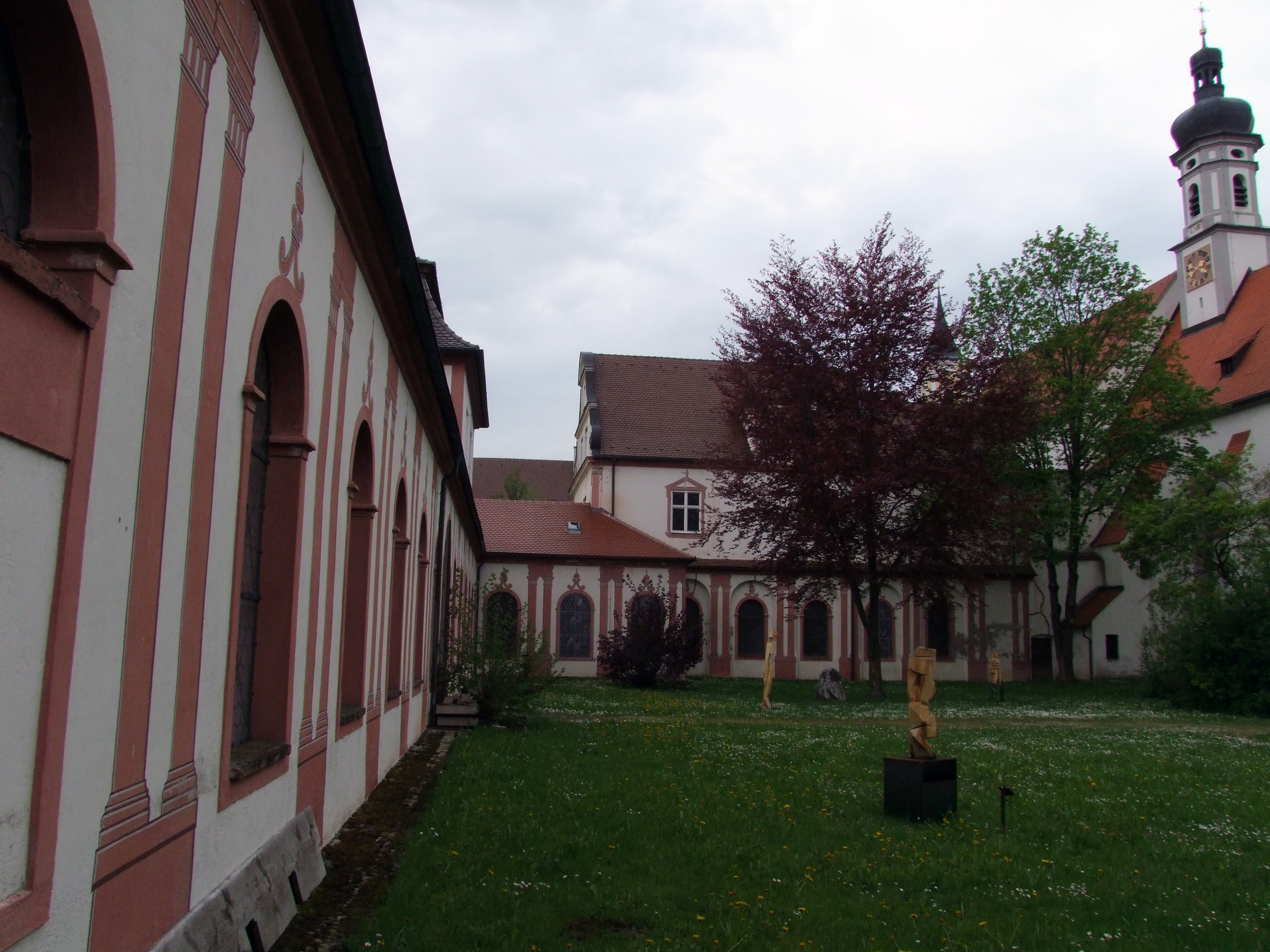 Klosterinnenhof der ehemaligen Reichskartause Buxheim. An dieser Stelle stand die Kapitelkapelle St. Nikolaus